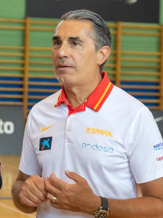 El polideportivo Triángulo de Oro de Tetuán acoge a la selección española masculina de baloncesto en su preparación para el Mundial que se disputa en China entre el 31 de agosto y el 15 de septiembre.